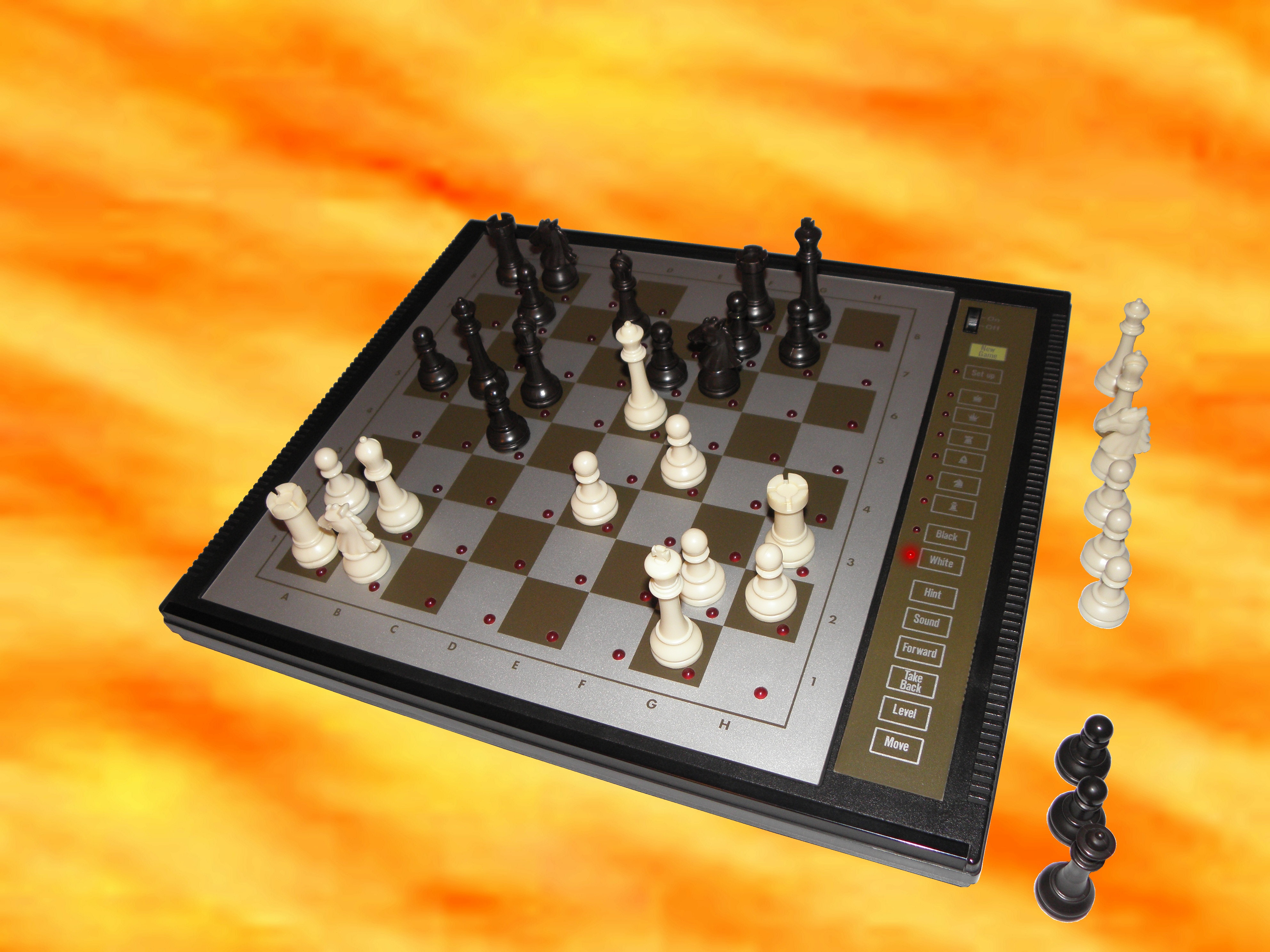 Jeux d'échecs électronique estimé à +/- 1700 Elo